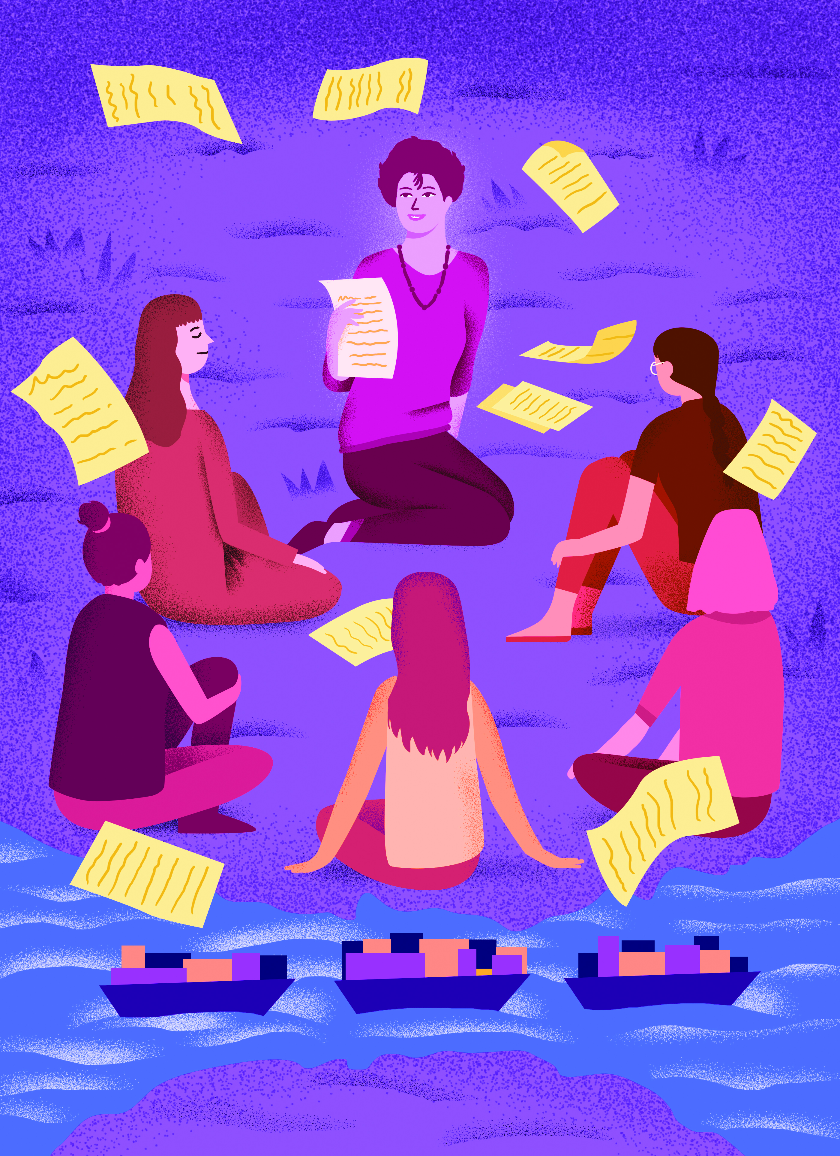 Ilustración realizada para el proyecto "Mujeres destacadas de la historia de la ciudad" de la Comisión 500 años de fundación de la ciudad de Panamá. La Comisión es presidida por la Alcaldía de Panamá y cuenta con el apoyo del Programa de las Naciones Unidas para el Desarrollo.